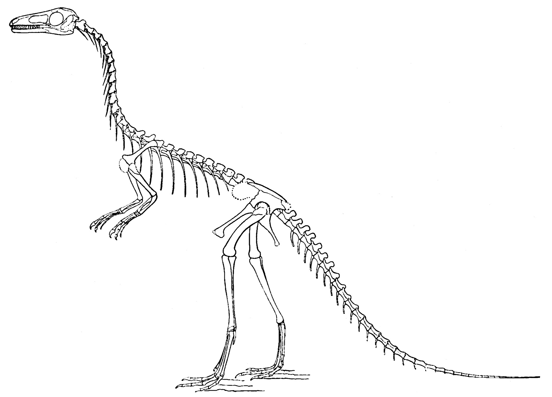 Compsognathus longipes skeleton.